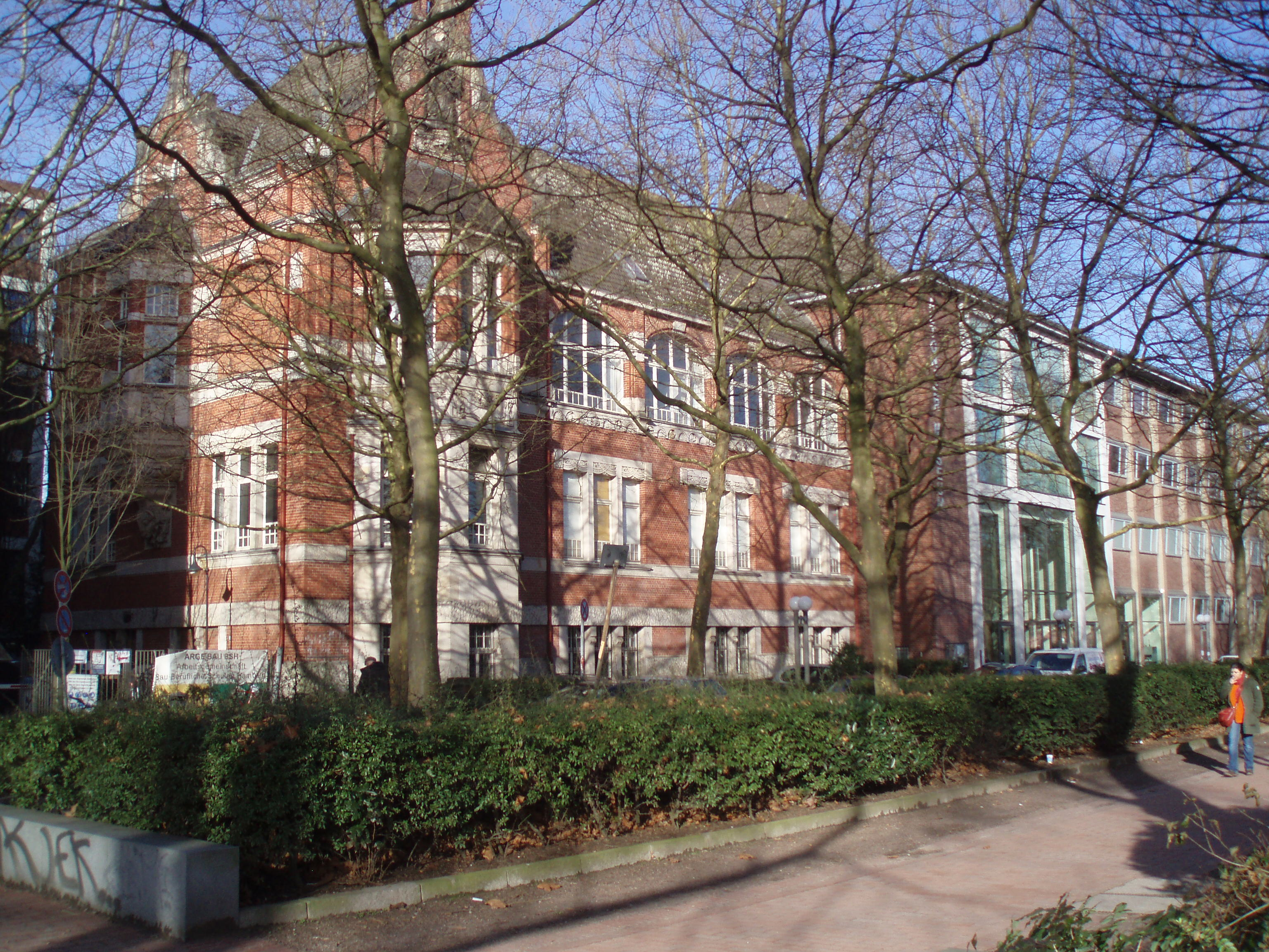 Altonaer Museum an der Museumstraße in Hamburg-Altona